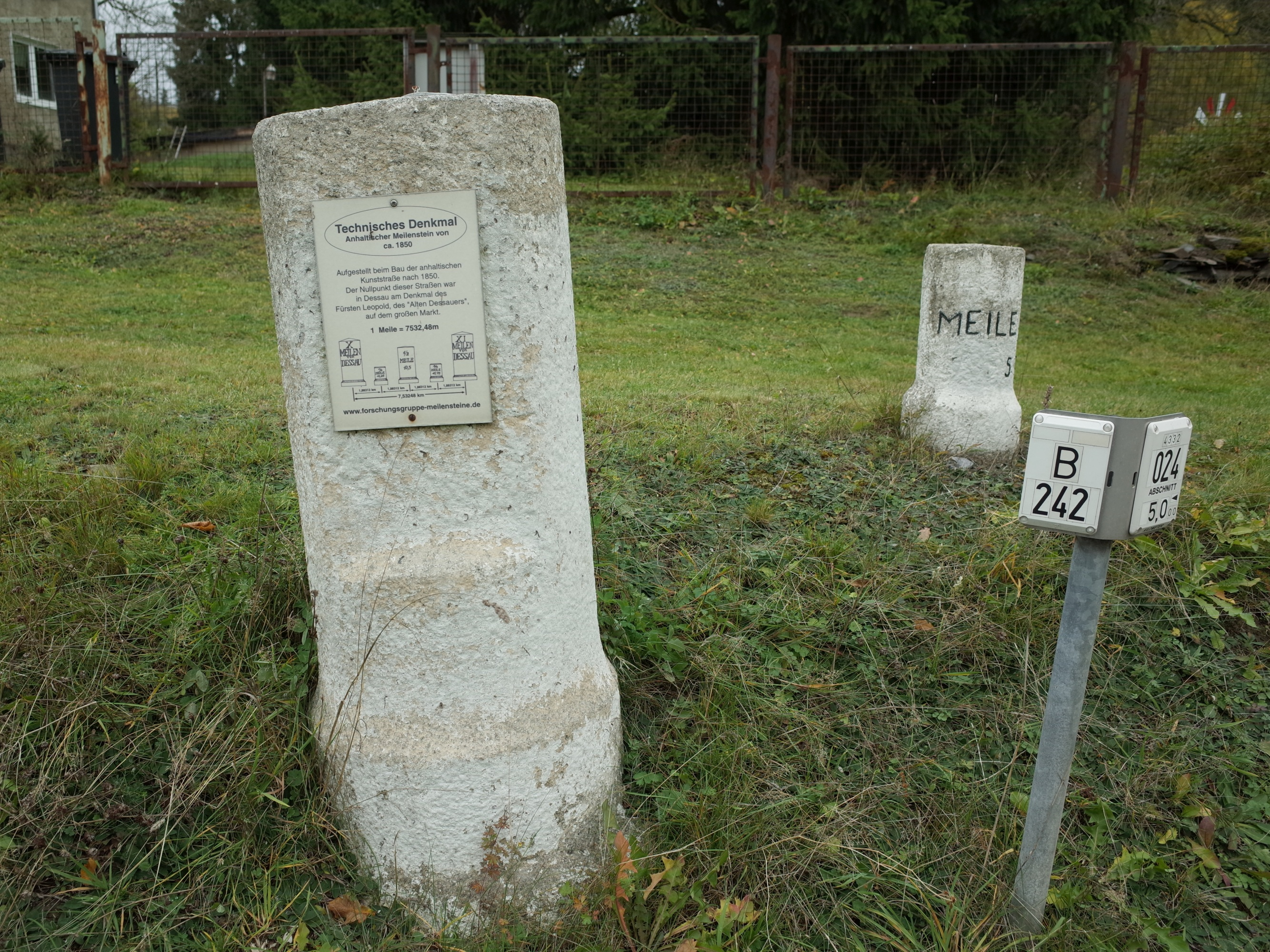 Harzgerode, Ortsteil Güntersberge, Distanzsteine, Rundsockelsteine (Anhaltischer Meilenstein und Viertelmeilenstein)